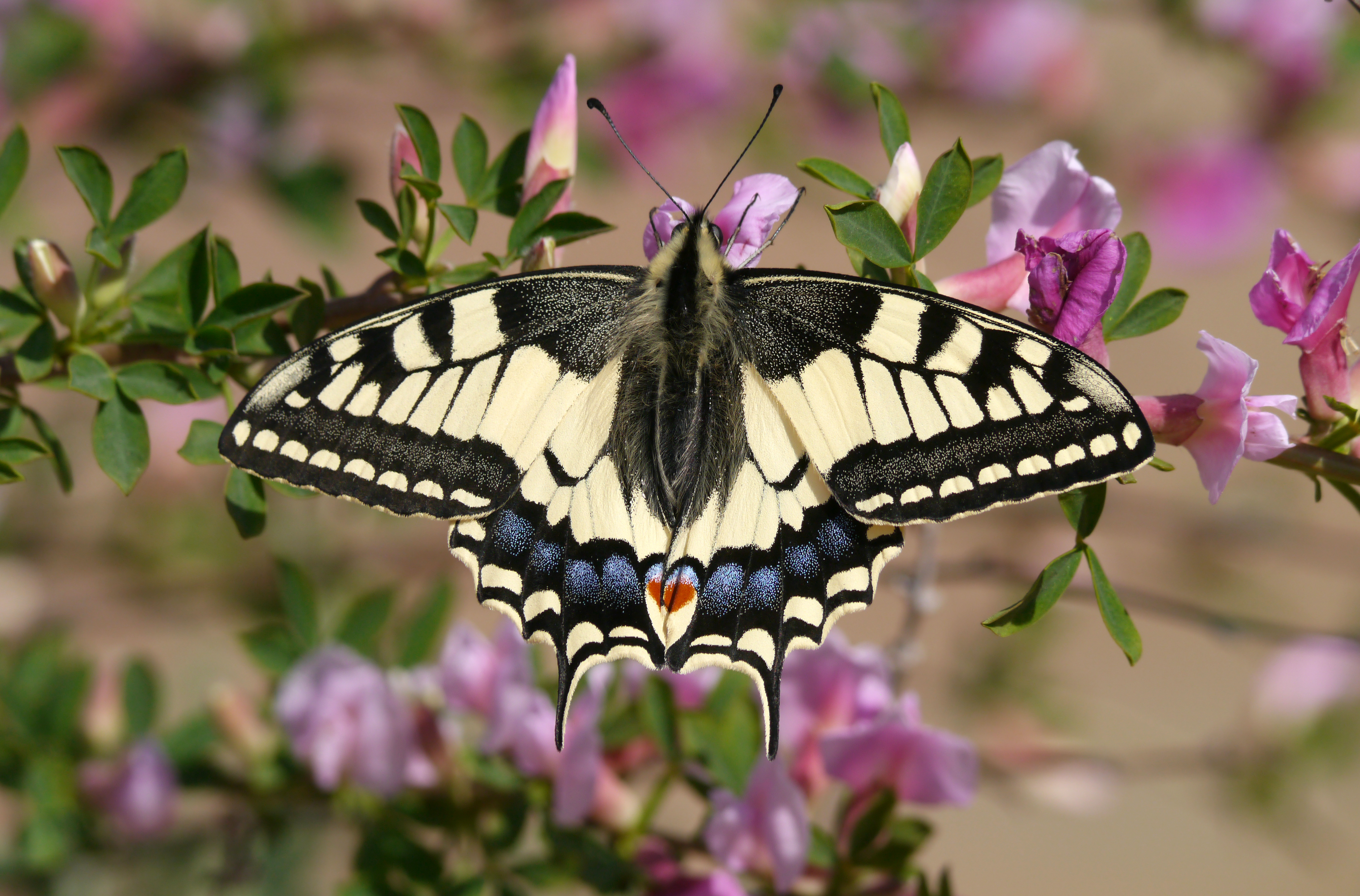 Schwalbenschwanz (Papilio machaon) auf der Grünen Brücke in Mainz